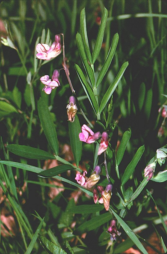 Berg-Platterbse (Lathyrus linifolius) in Unterfranken